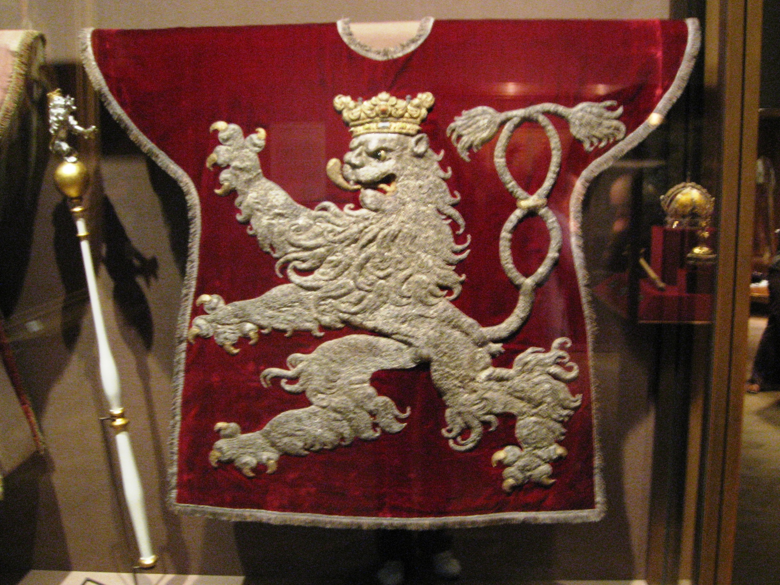 Wappenrock für den Herold vom Königreich Böhmen.